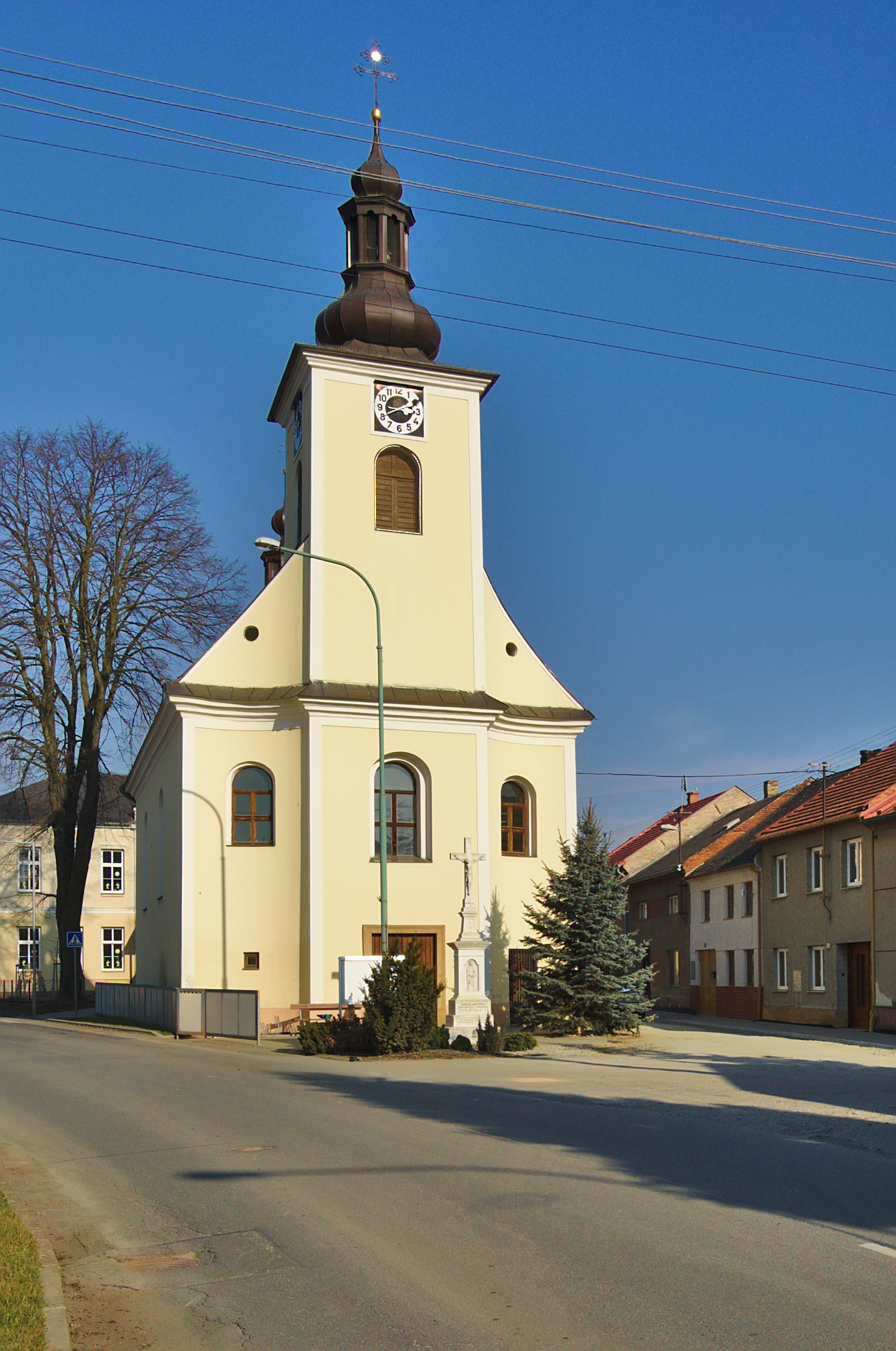 Kostel svatého Cyrila a Metoděje, Bystročice, okres Olomouc